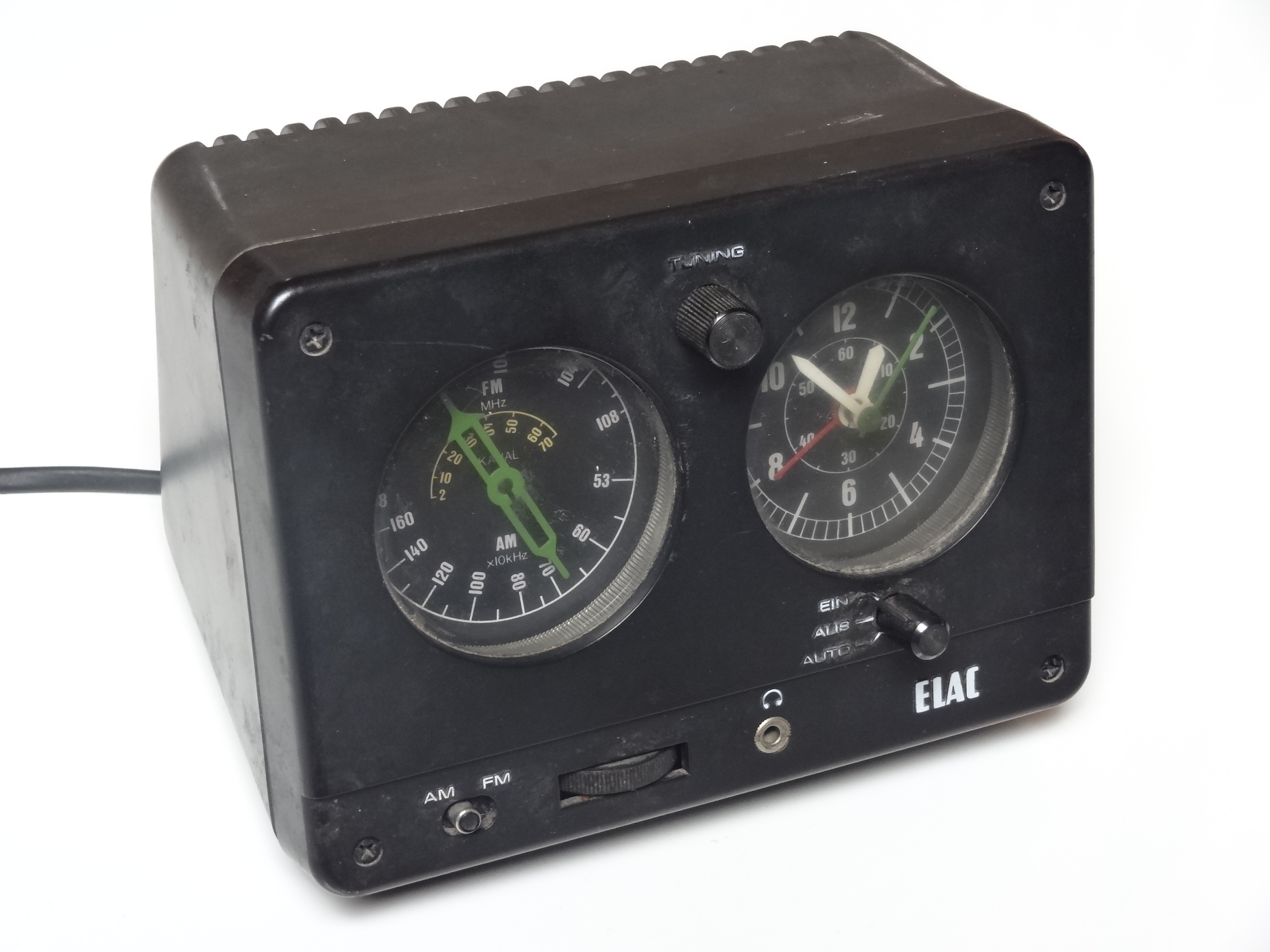 "Elac RD 50 AM/FM-Uhrenradio im Cockpit-Look."